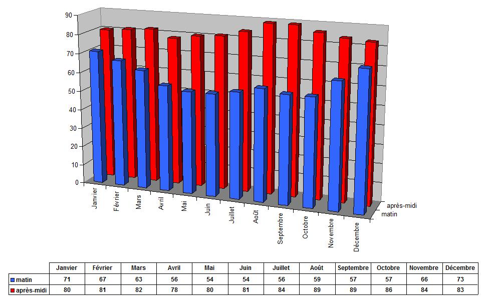 Hygrométrie à Delphos (Ohio - Etats-Unis)